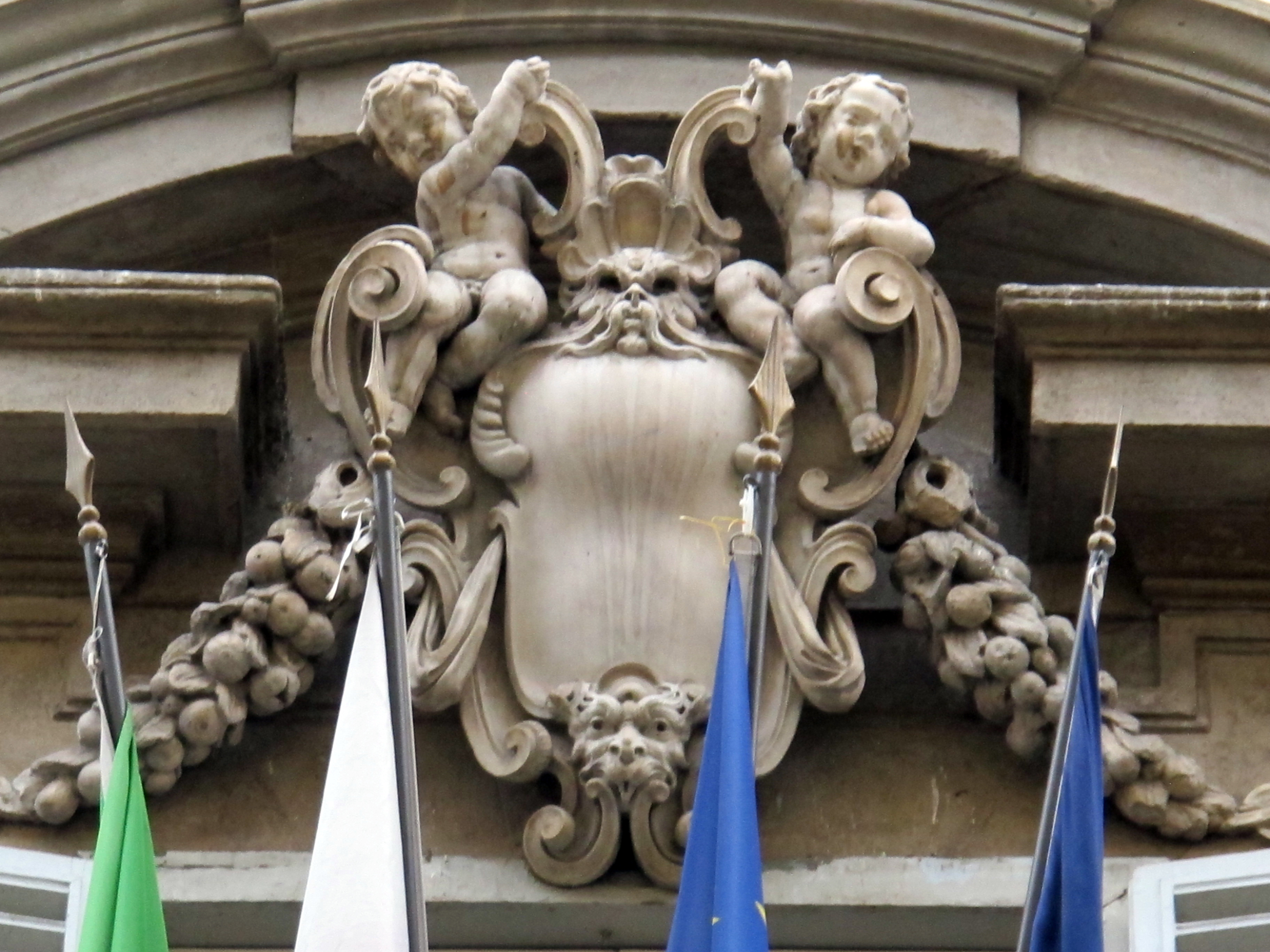 Via ghibellina 96, palazzo jacometti ciofi, stemma